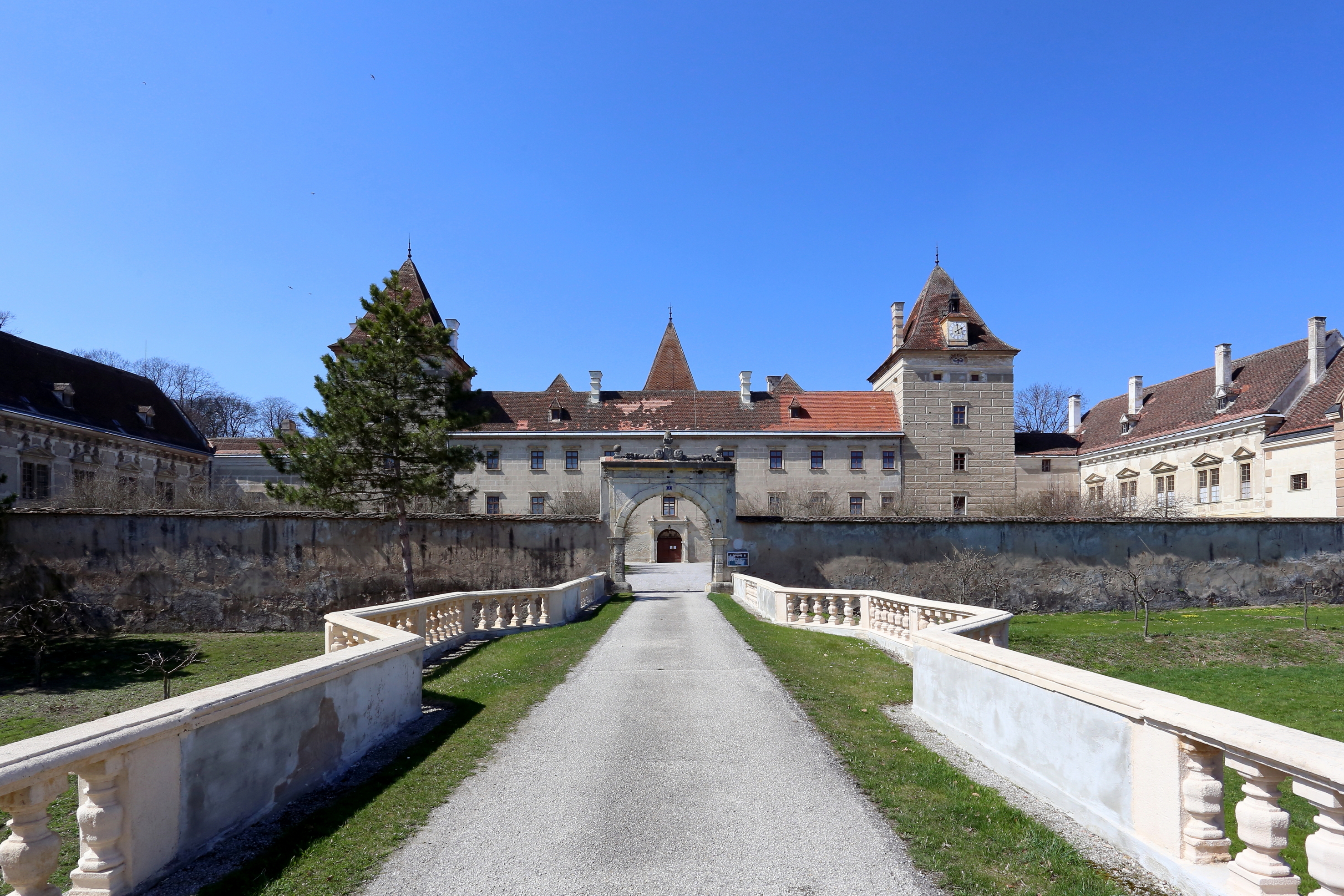 Südostansicht des niederösterreichischen Schloss Walpersdorf. Das Schloss ist in Ausstattung und Erhaltung ein bedeutender Spätrenaissancebau mit Erweiterungen aus dem 17. Jahrhundert.